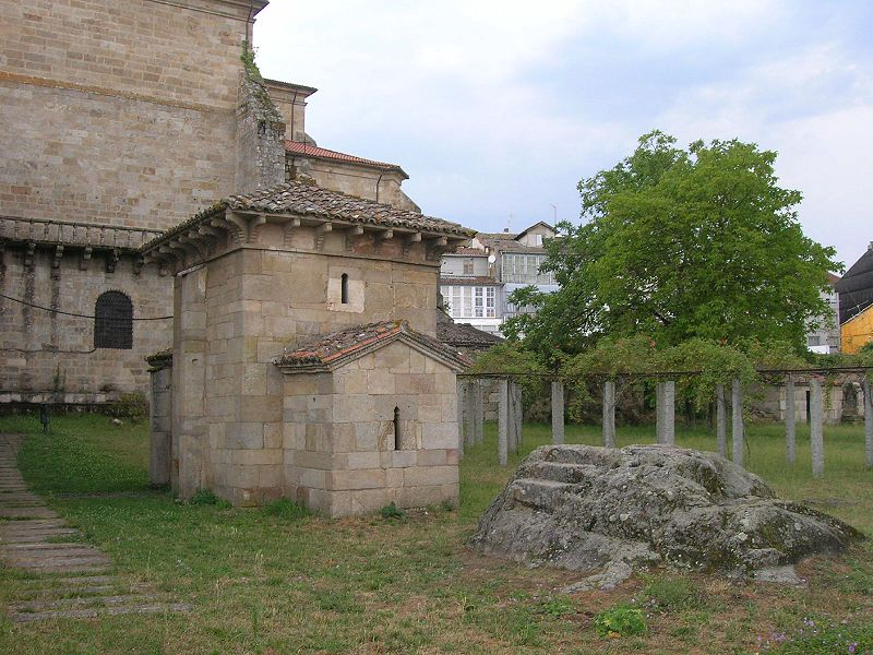 Description Capela de San Miguel do mosteiro de San Salvador de Celanova Date29 May 2007Source Antonio Gil Martínez. FREECATPermission (Reusing this file) cc-by-2.0 Capela de San Miguel do mosteiro de San Salvador de Celanova